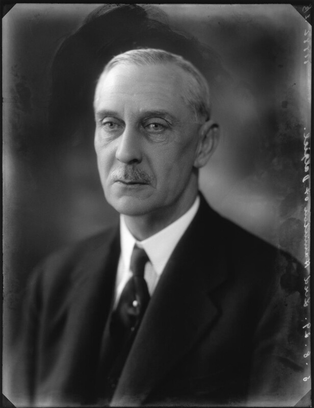 Lord Hamilton